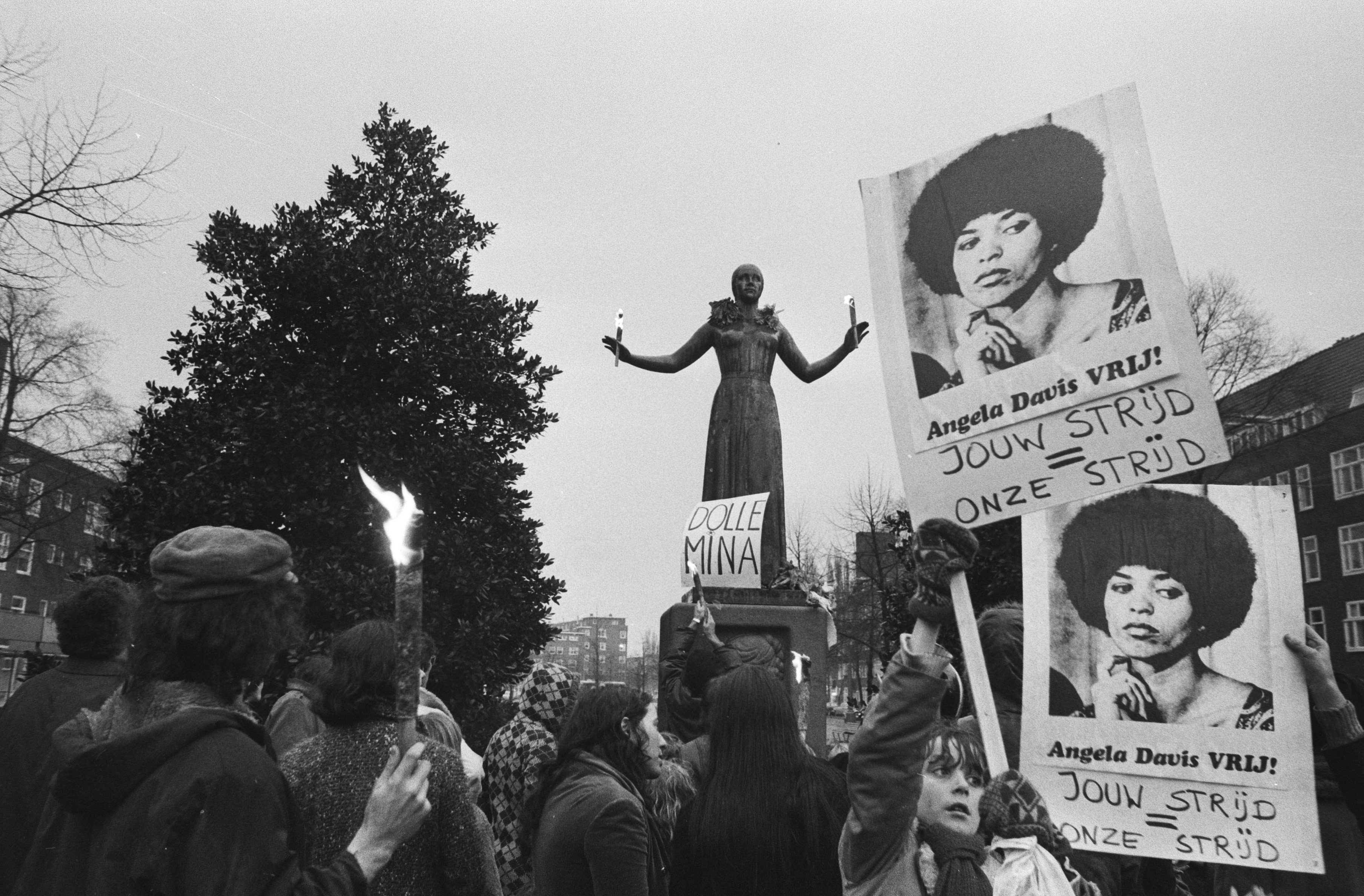 Collectie / Archief : Fotocollectie Anefo Reportage / Serie : [ onbekend ] Beschrijving : Dolle Mina's vieren eenjarig bestaan, Amsterdam; demonstratie o.a. voor Angela Davis bij het Wilhelmina Druckermonument (door GJ van der Veen) op Churchilllaan Datum : 30 januari 1971 Locatie : Amsterdam, Noord-Holland Trefwoorden : demonstraties Instellingsnaam : Dolle Mina Fotograaf : Mieremet, Rob / Anefo, [onbekend] Auteursrechthebbende : Nationaal Archief Materiaalsoort : Negatief (zwart/wit) Nummer archiefinventaris : bekijk toegang 2.24.01.05 Bestanddeelnummer : 924-2214